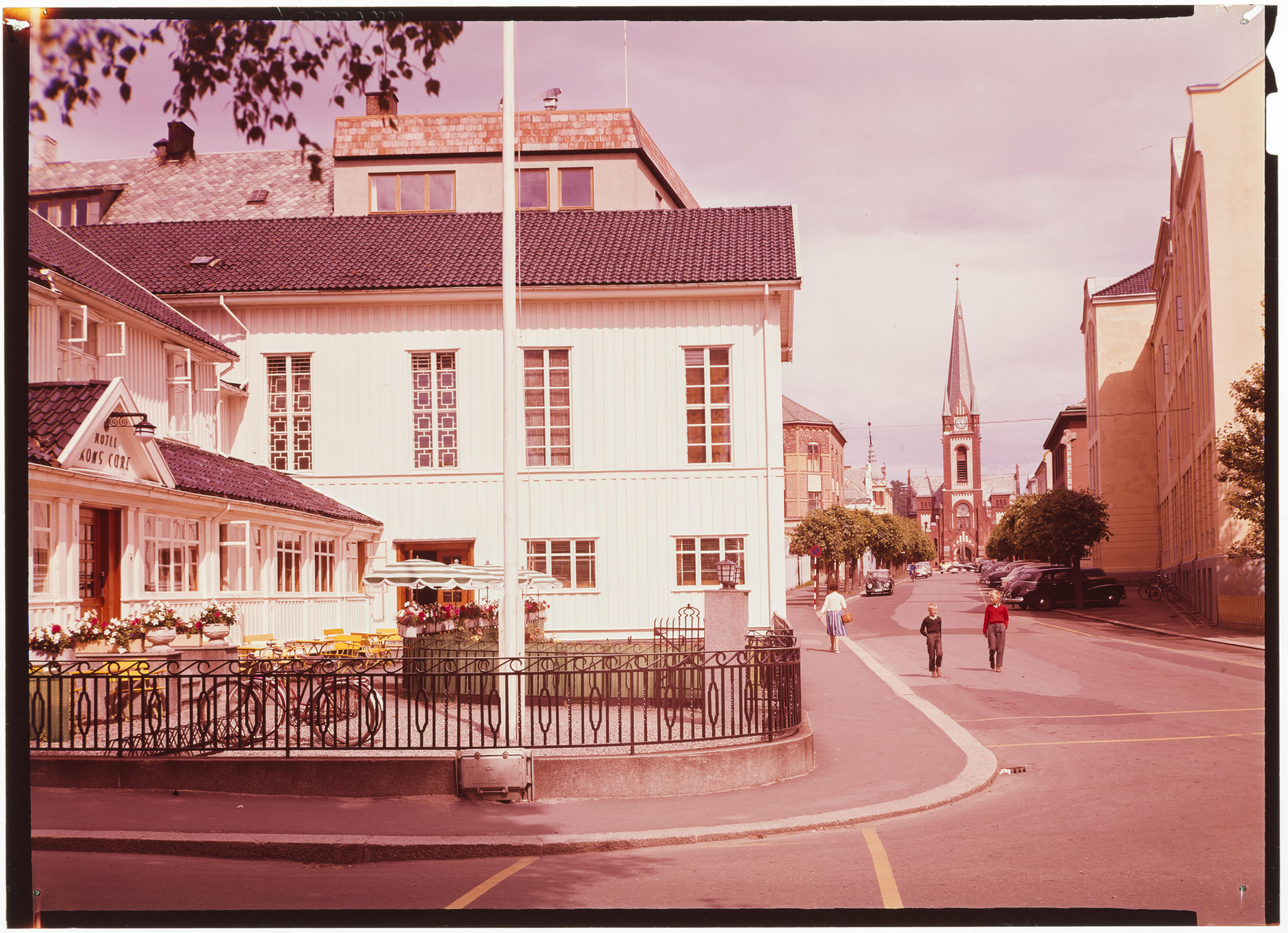 Bildet er hentet fra Nasjonalbibliotekets bildesamling. Anmerkninger til bildet var: Tittel er hentet fra emballasje. Sandefjord, Sandefjord, Vestfold